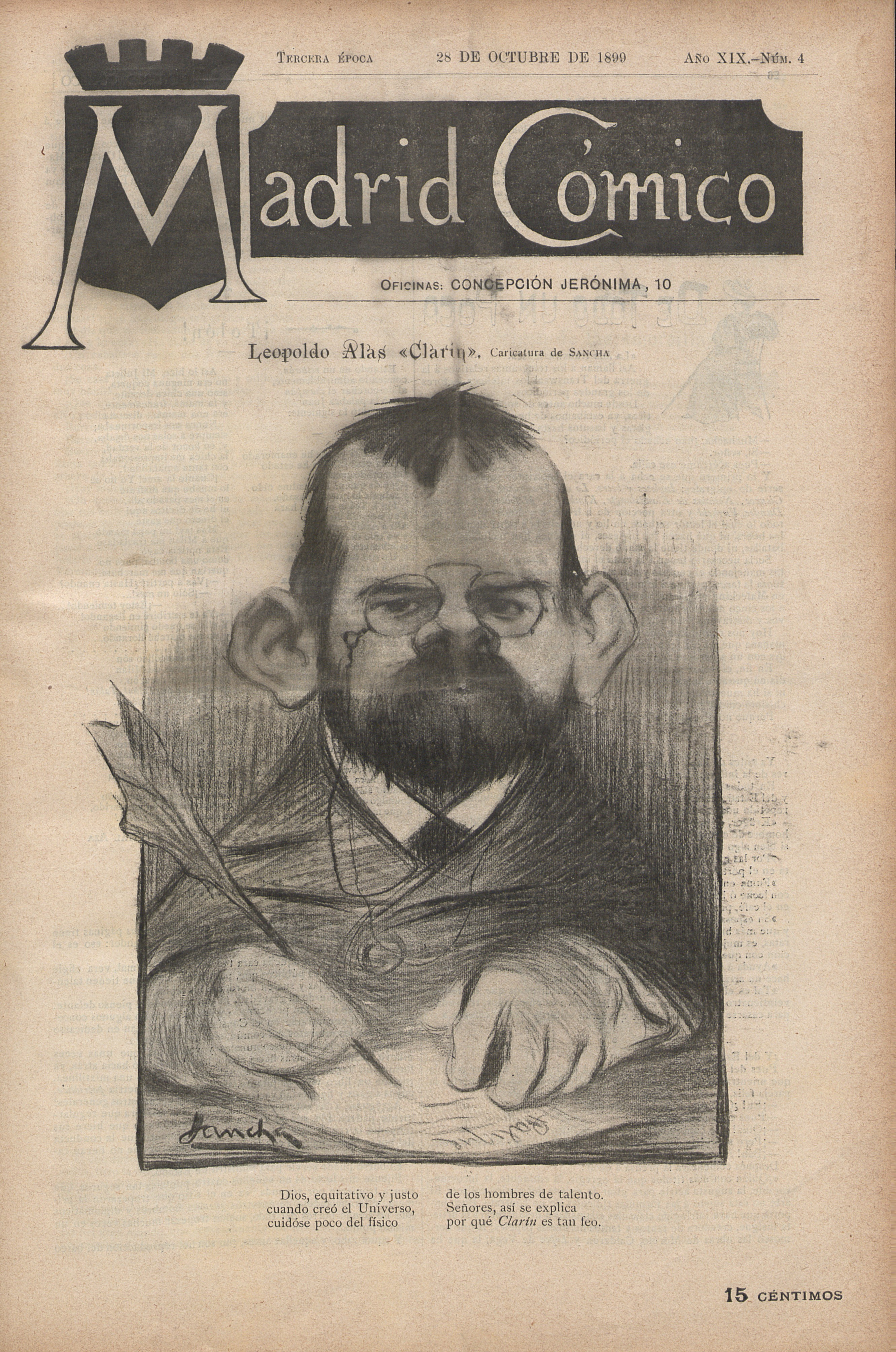 Madrid Cómico, 28 de octubre de 1899.